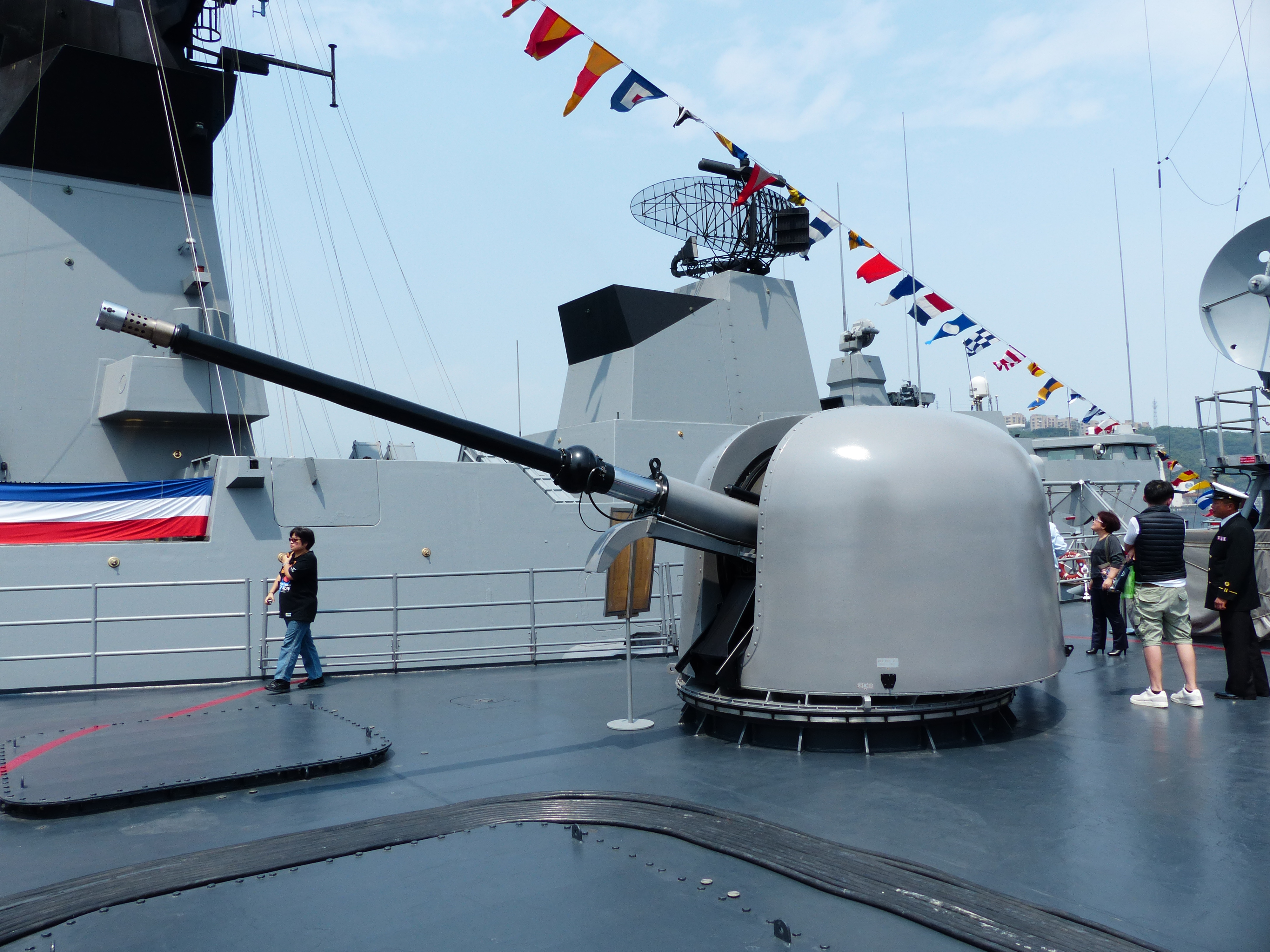 中文（台灣）: 巡防艦子儀（PFG-1107）中部上甲板的OTO Melara 76mm快砲。